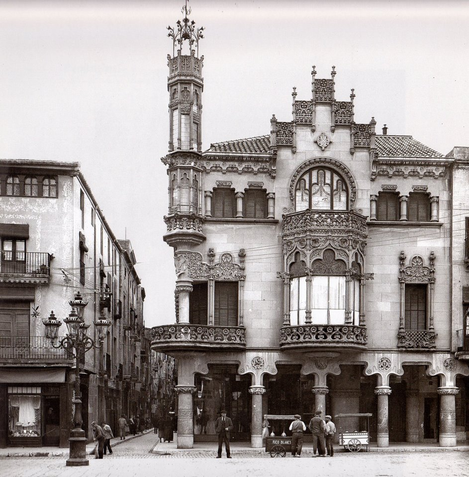 Imayge de Cal Navàs el 1918, a Reus